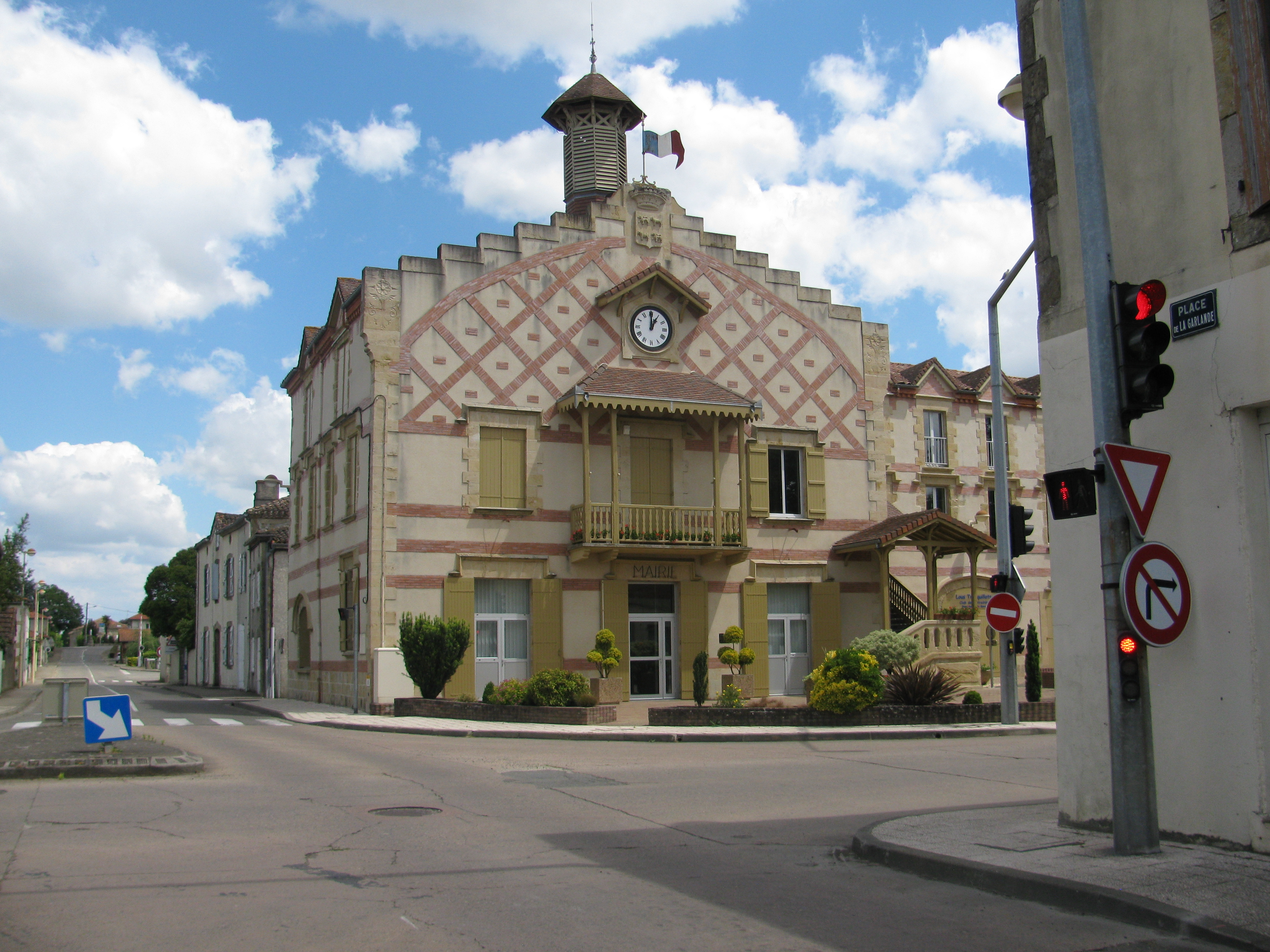 mairie de Barcelonne-du-Gers